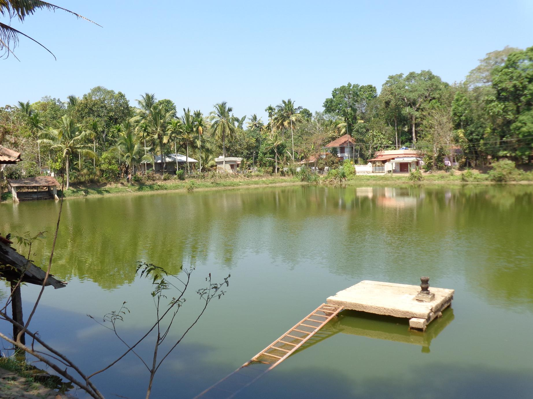 thrpperunthura mahadeva temple, chennithala, mavvelikara